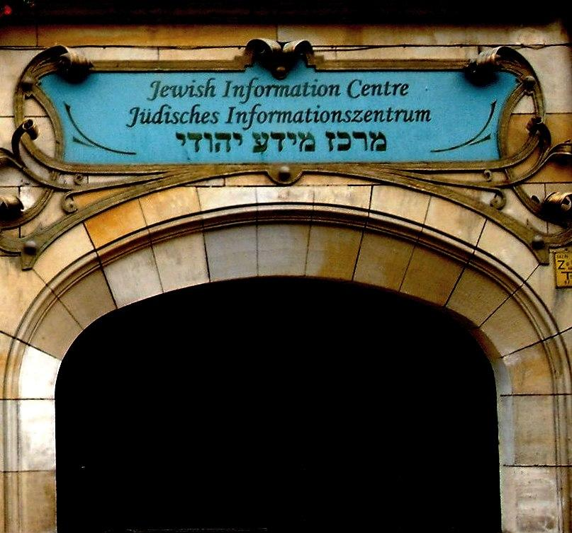 Wrocław, ul. Włodkowica 5, A, Jüdisches Informationszentrum.